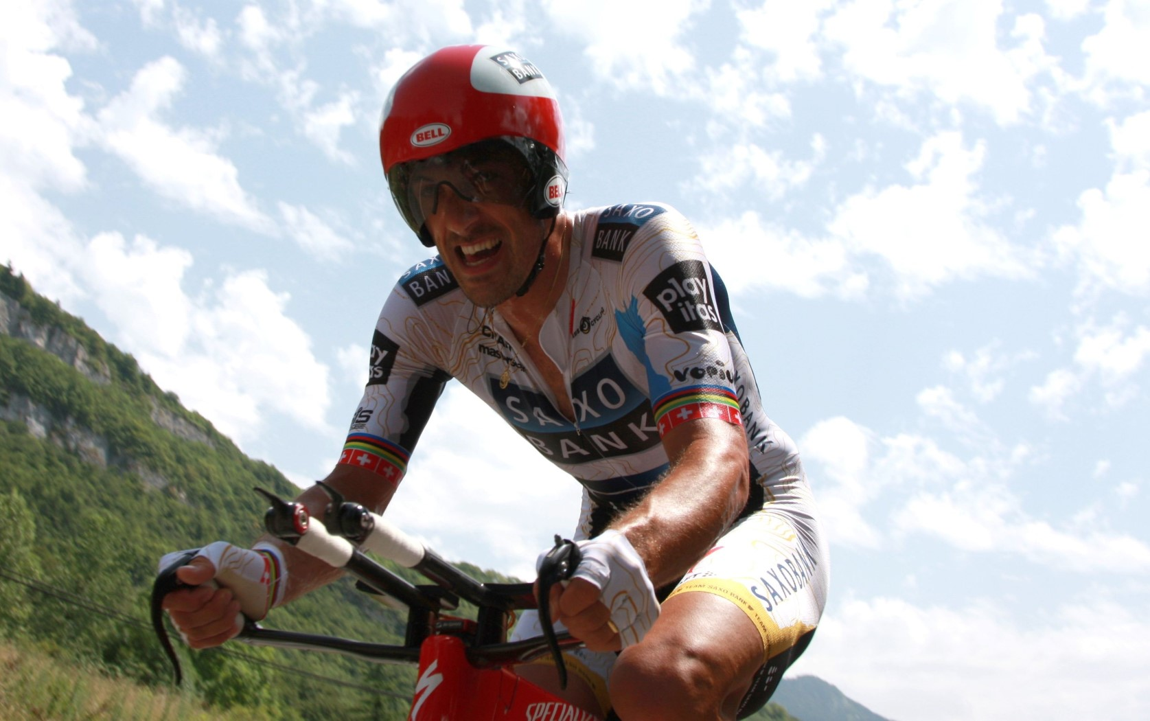 9079 canc